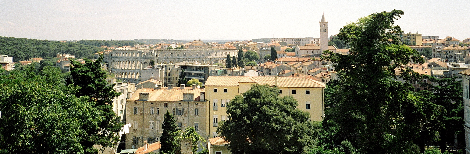 Pula - panorama